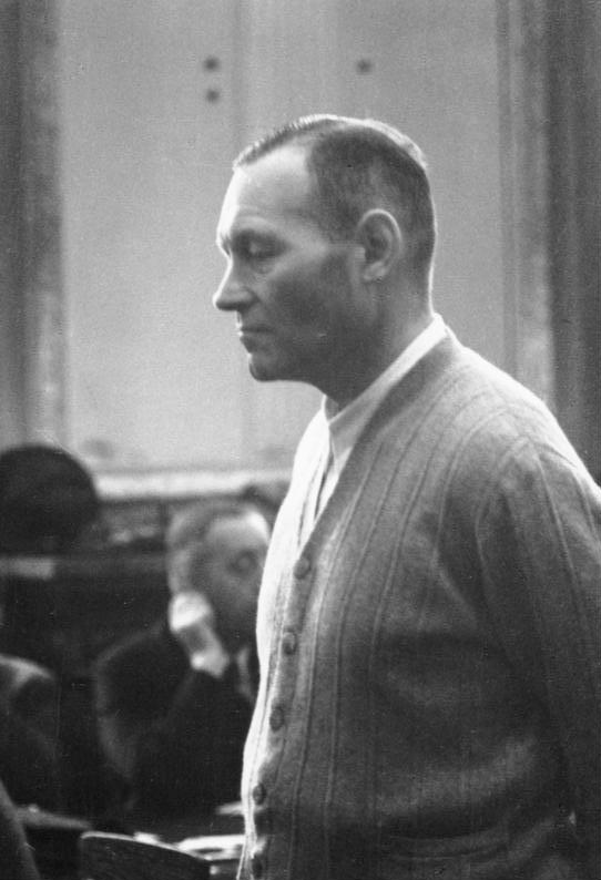 Berlin, Volksgerichtshof, Erich Hoepner Berlin.- Volksgerichtshof, Prozess nach dem 20. Juli 1944, Angeklagter Erich Hoepner Abgebildete Personen: Hoepner, Erich: Generaloberst, Ritterkreuz (RK), Heer, Prozeß 20. Juli 1944, Deutschland (GND 118552120)